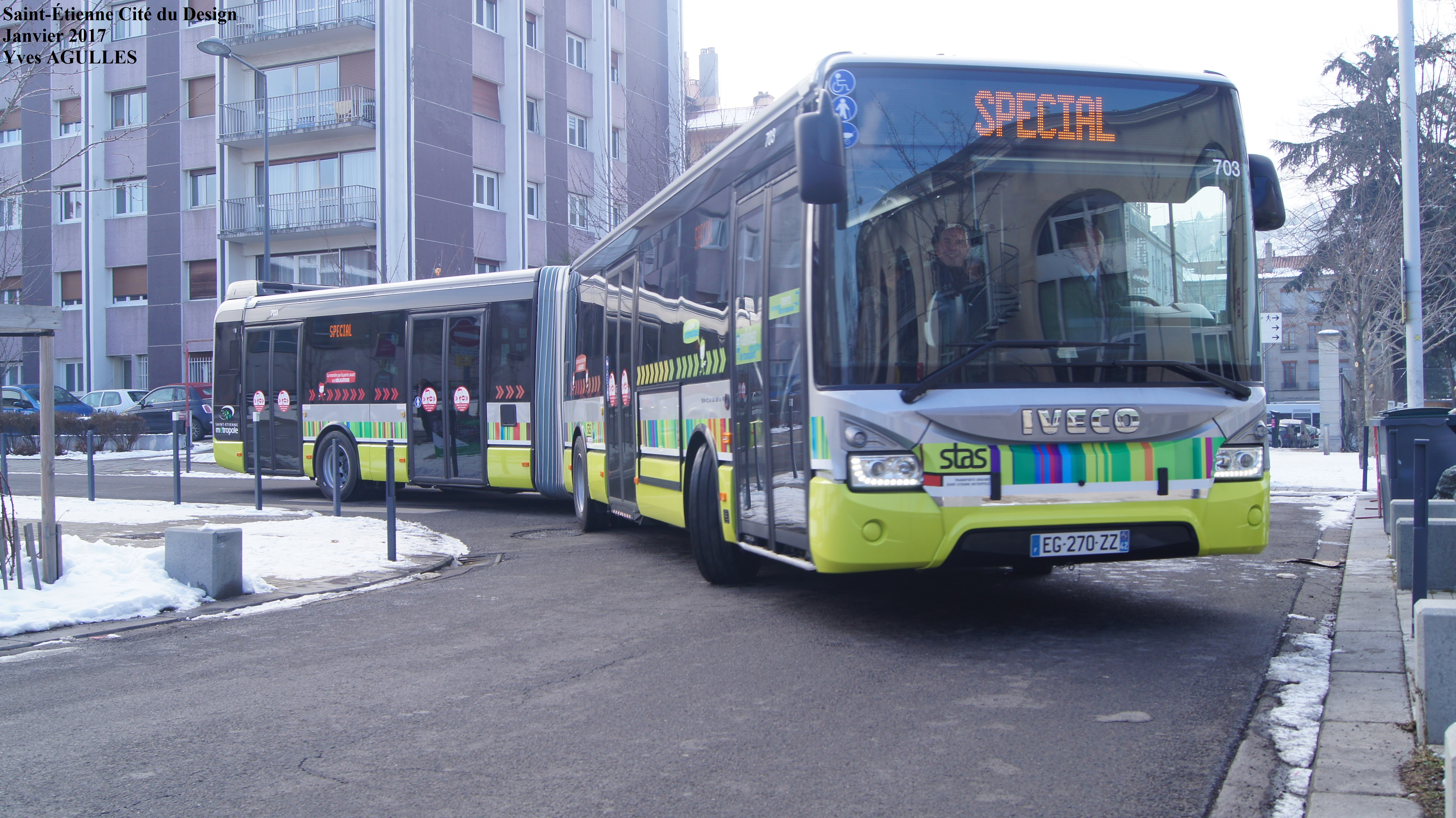 Cité du Design Saint-Etienne